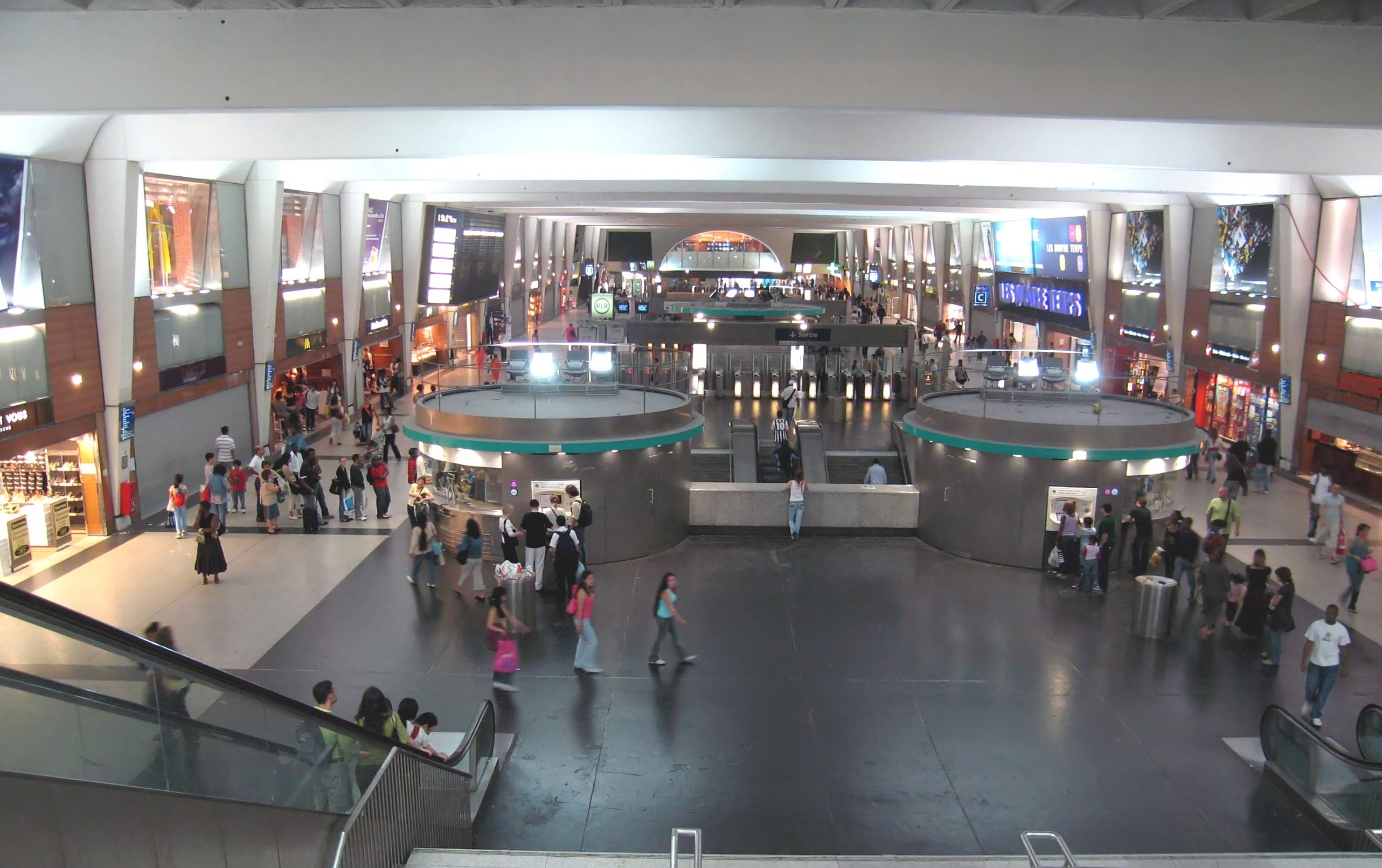 Description : Station de la Défense sur la ligne A du RER Place : La Défense, Paris, France Date : juin 2006 Author : Pline photo personnelle